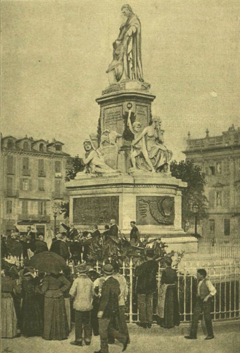 Camillo Benso di Cavour szobrának megkoszorúzása a magyar küldöttség által.